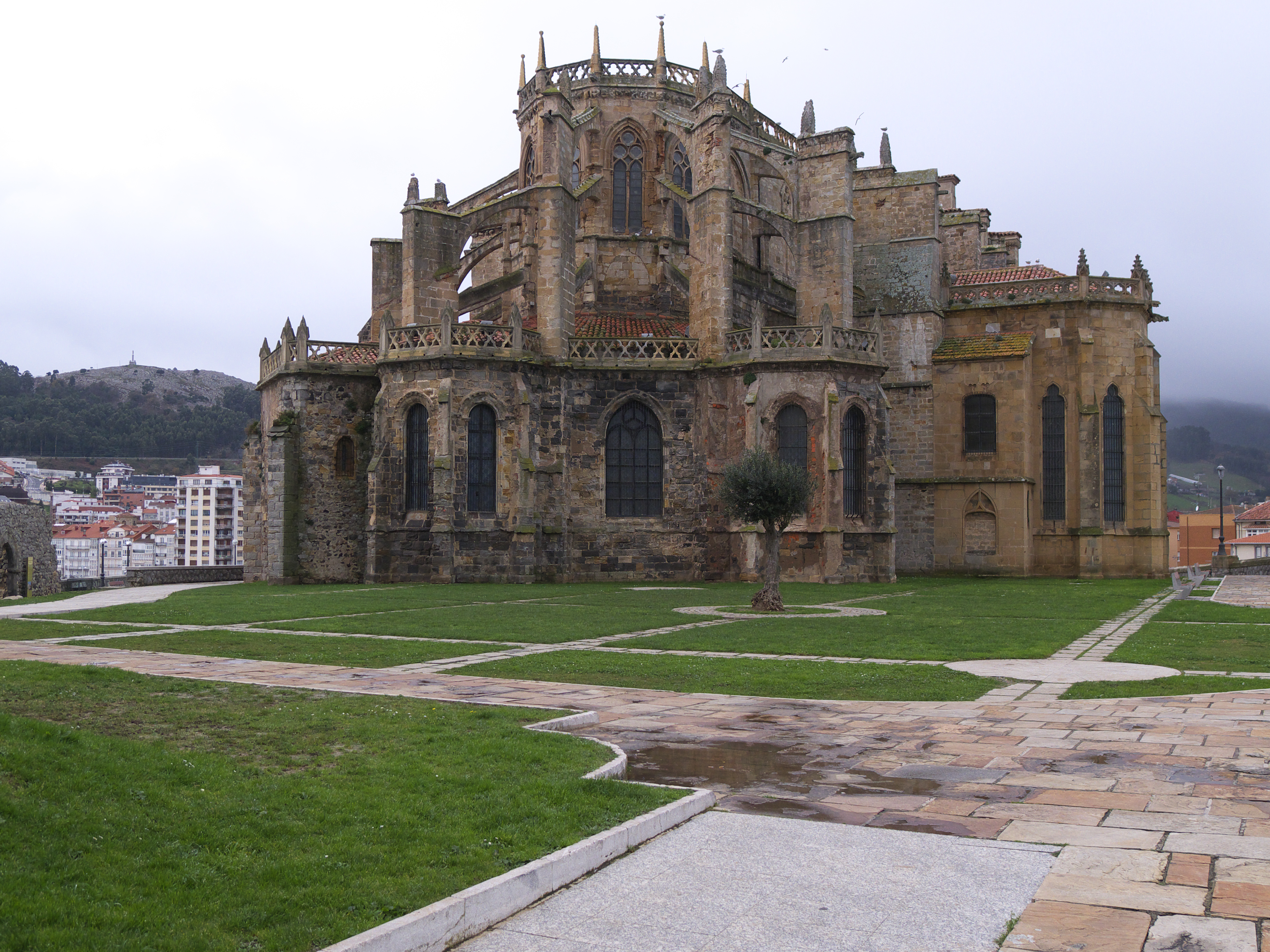 Esta construcción presentó problemas estructurales importantes, necesitando refuerzos en los arbotantes.